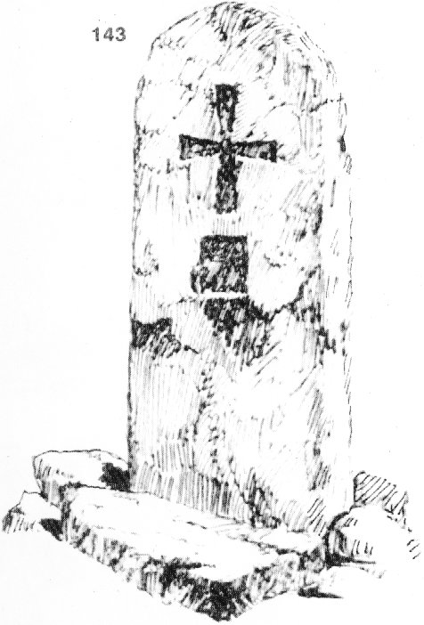 143. Оброчище “Петровският кръст” вън от града Тетевен, посред красива местност, заобиколен от високи кичести дървета. От незапомнени времена се издига „Петровският кръст". Тук през време на суша населението излиза да се моли за дъжд; на Петровден правят молебен, па и през други празници много верующи дохождат тук, палят свещи за здраве и го кичат с цветя. Паметникът е издялан грубо от пепеляв варовит камък; горният му край е полукръгъл, а долният е залостен с камъни в земята. Върху лицето му е издълбан кръстът с разширяващи се навън крила - по-къси, а другите две по-дълги; под кръста четвъртита ниша, плитка, за свещи. Размери: 140x50x15 см. Скициран на 19 VП .1916 г. (Т. 7, обр. 93.)